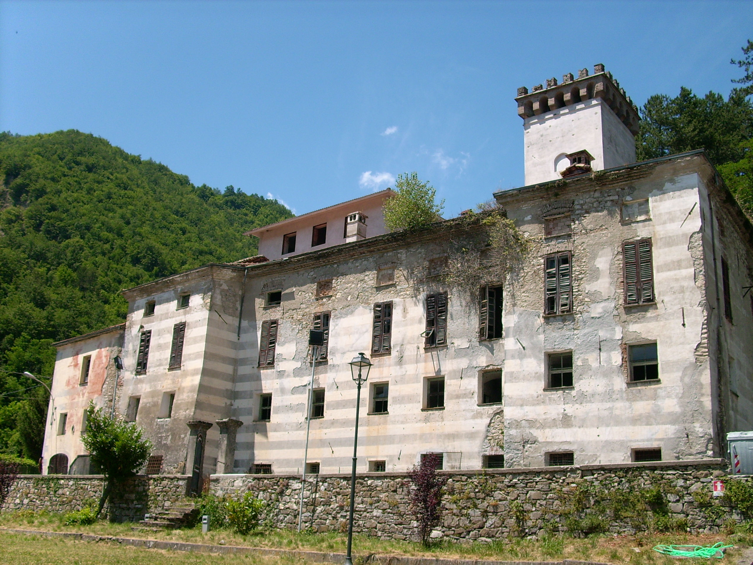 Palazzo Centurione di Gorreto, Liguria, Italia